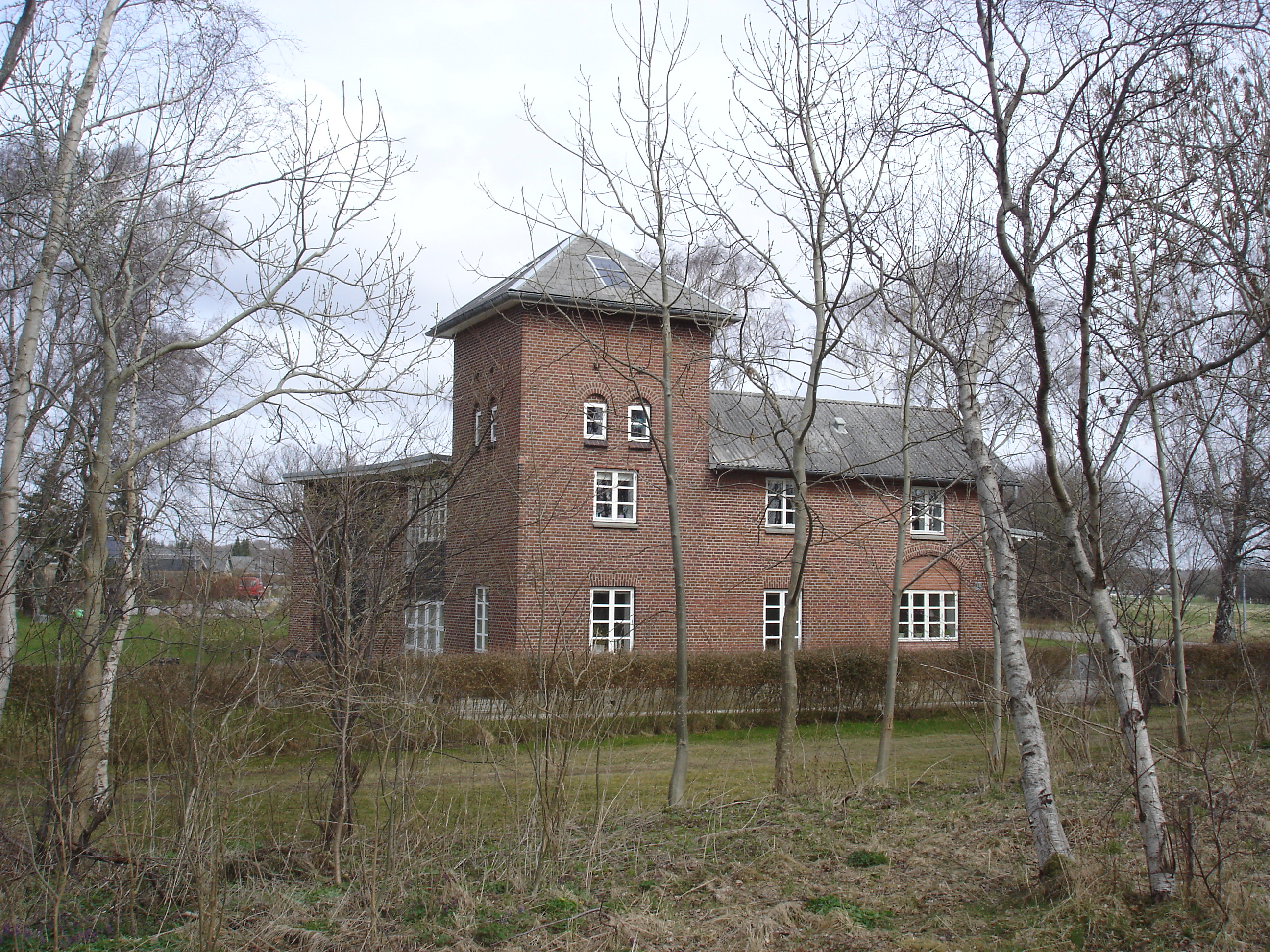 Vodskov Remise fra S